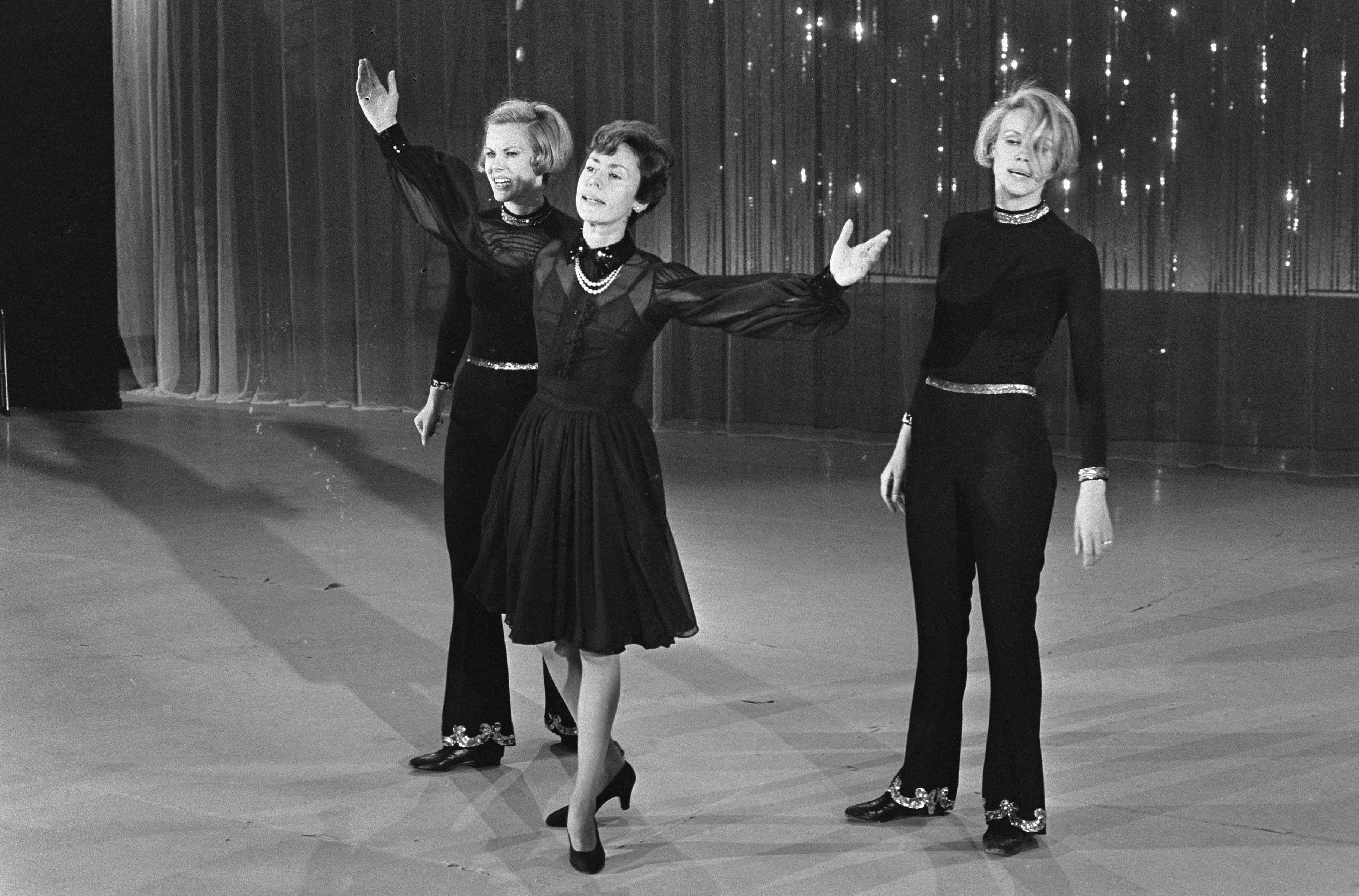 Aufzeichnung der Caterina-Valente-Show im Amsterdam RAI: Caterina Valente (Mitte) und die Kessler-Zwillinge